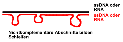 Eine Heteroduplex aus zwei einsträngigen Nukleinsäuremolekülen unterschiedlicher Herkunft. Sie werden durch Wasserstoffbrücken zwischen komplementären Abschnitten zusammengehalten. Es kann sich bei den Einzelsträngen um Einzelstrang-DNA (single-strand-DNA, kurz ssDNA), oder um RNA handeln.